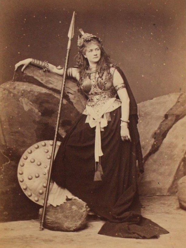 Marie Haupt Kostümfoto von 1876, Beyreuther Festspiele